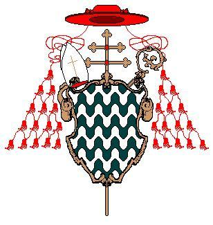 Stemma del Cardinale Giuseppe Archinto, Arcivescovo di Milano.